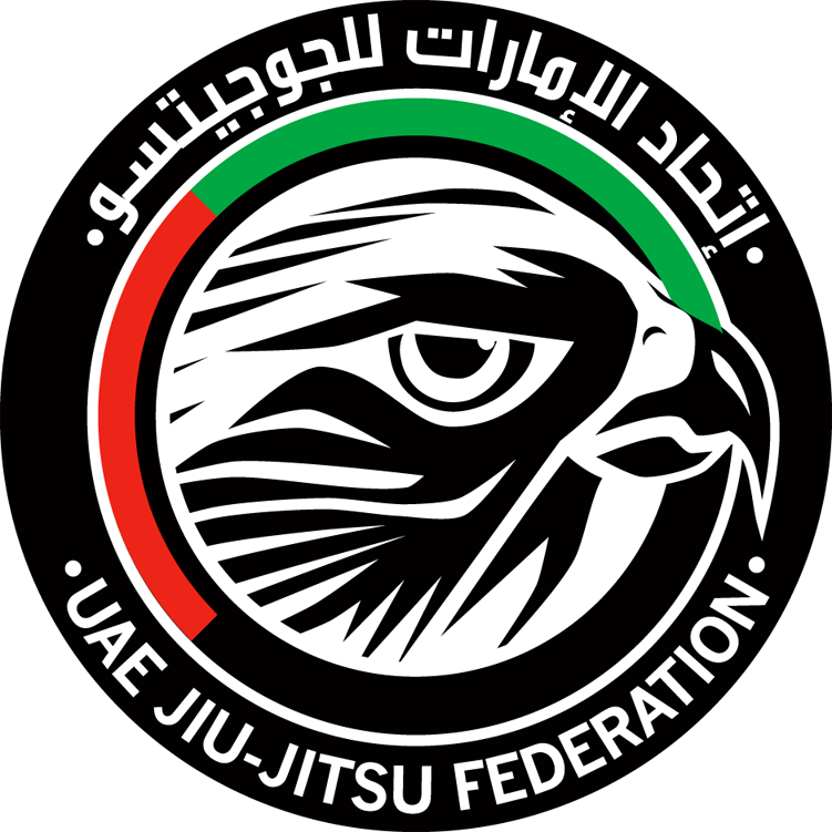 اتحاد الإمارات للجوجيتسو